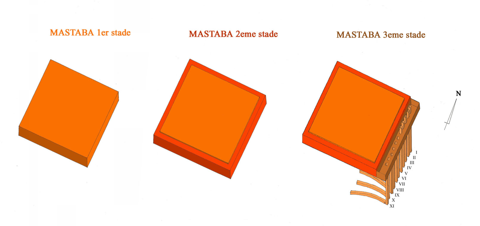 évolution du mastaba (M1-M2-M3) de Djoser à Saqqarah